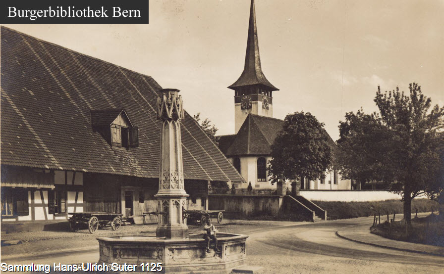 Bern: Bümpliz; Davidbrunnen -- Brunnen